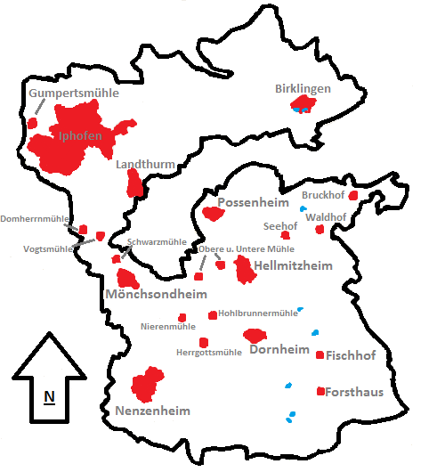 Karte: Ortsteile der Stadt Iphofen, Legende: schwarz- Gemeinde Iphofen, blau- Fluss Main, Seen, rot- besiedelte Fläche